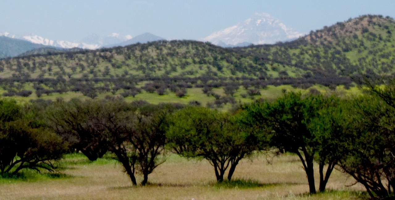 Sabanas mediterráneas en la zona norte de la Región Metropolitana de Chile.